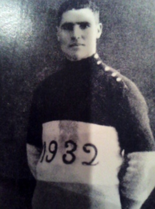 Marinus Valentijn in gebreide NK Kampioenstrui 1932